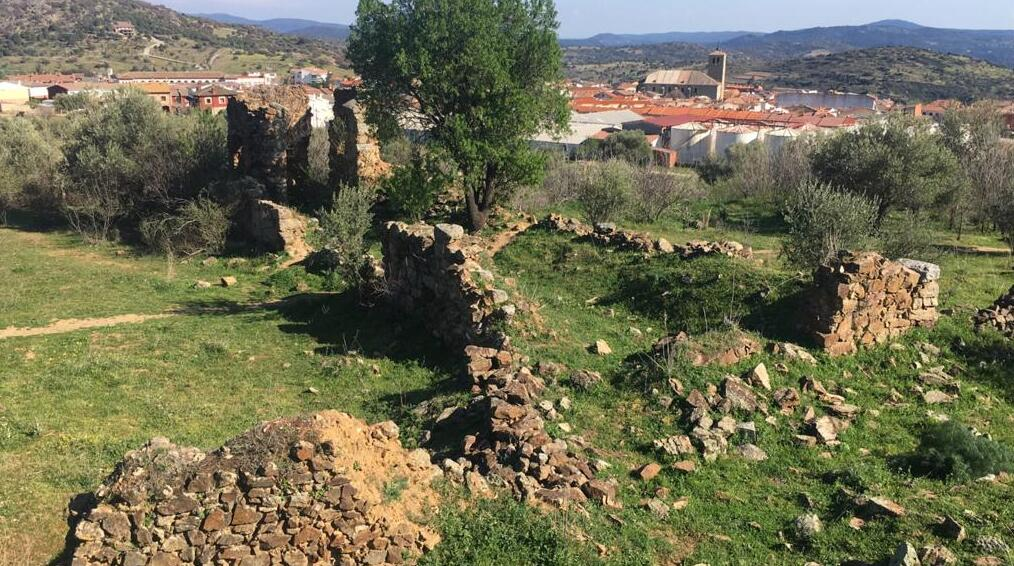 Estructura del Convento 'El Dulce nombre de Jesús' (Cebreros), en el que se muestran los restos de la abadía, permitiendo observarse algunos muros que siguen en pie y que denotan una división del convento. Separada queda la zona religiosa del resto de secciones que componían el convento, siendo el área eclesiástica la situada en la parte norte de la imagen.